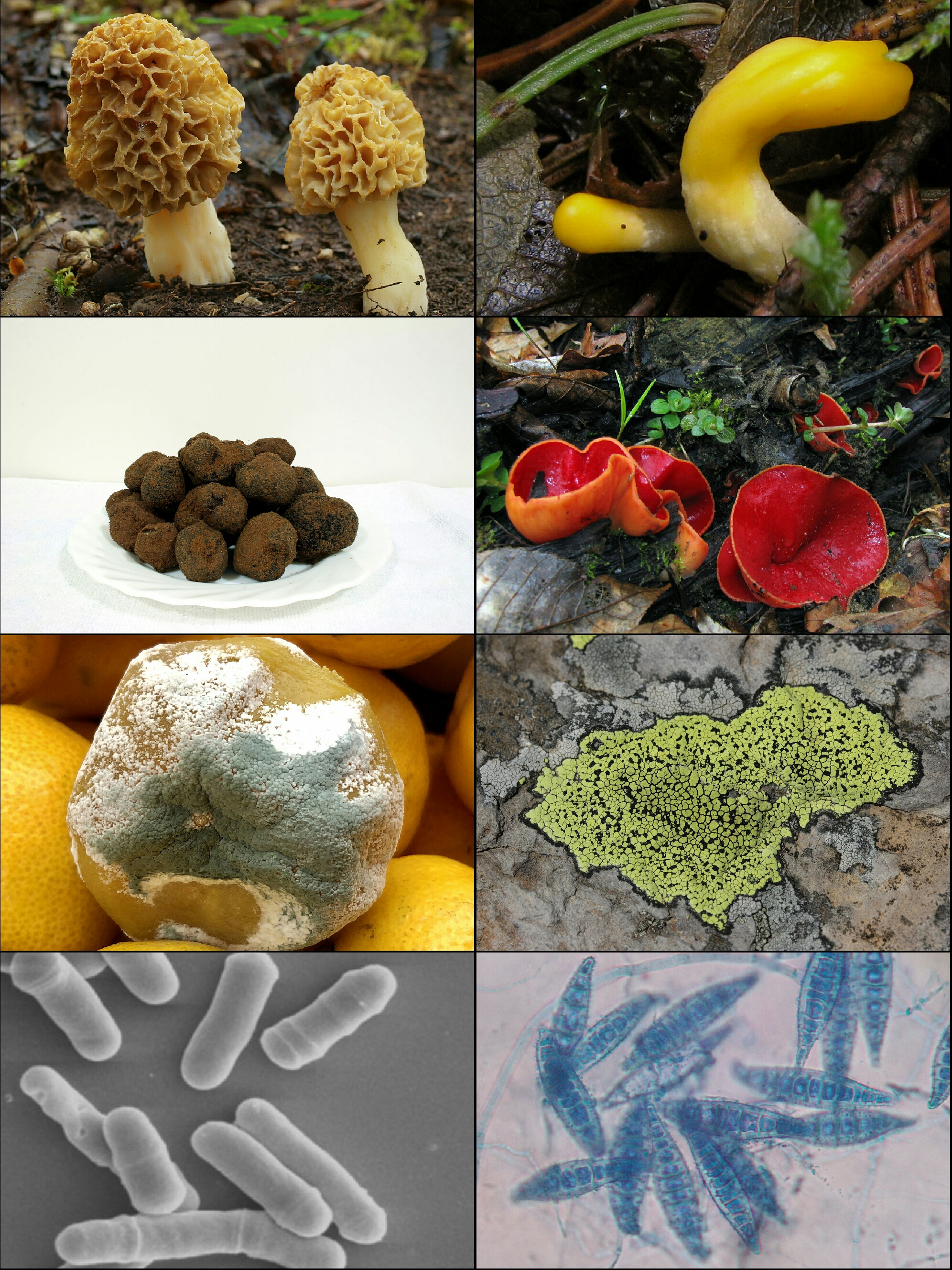 Collage de ascomicetos basado en imágenes de Commons.